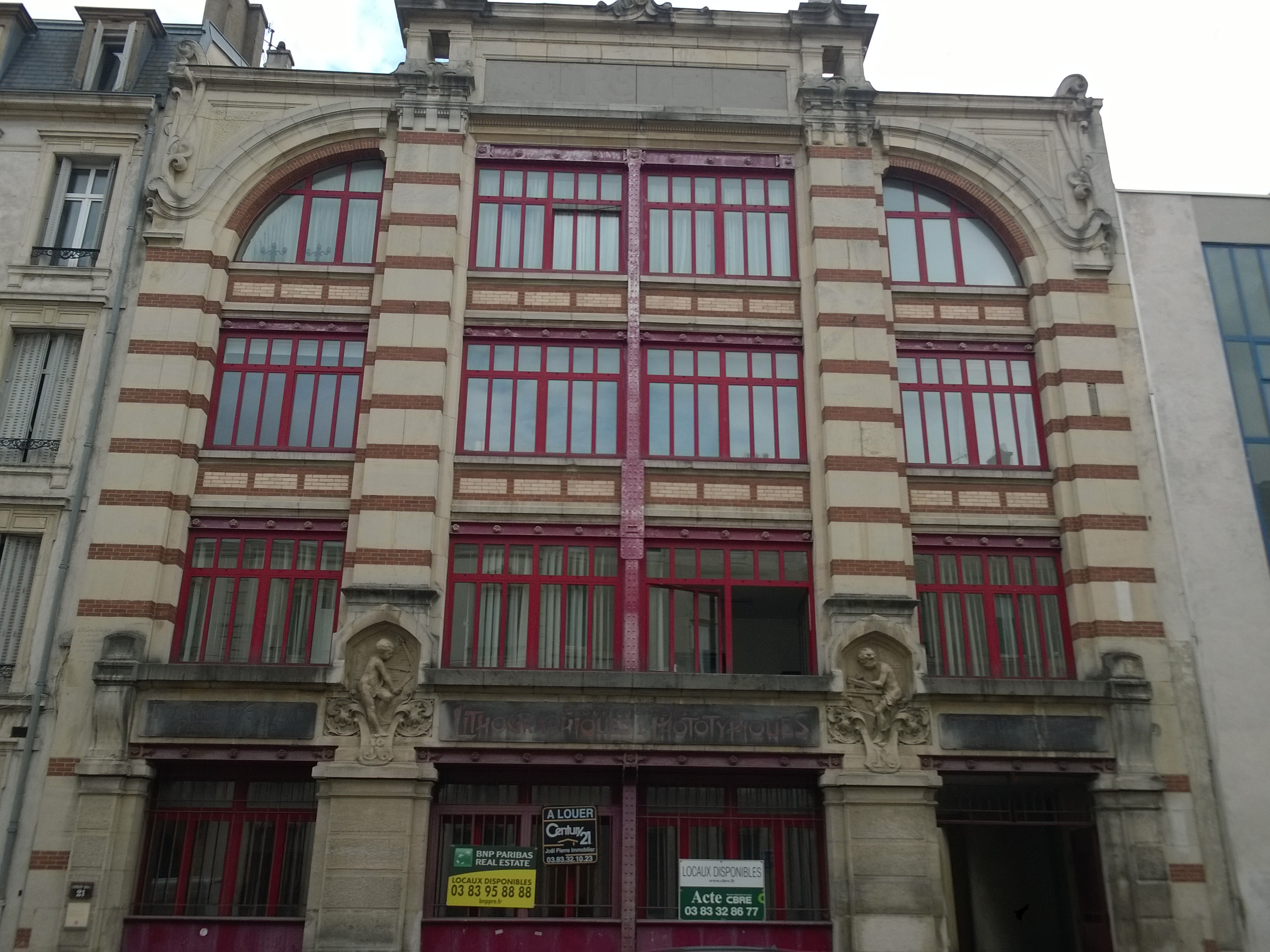 Ancienne imprimerie Royer (1900) au 3bis rue de la Salpétrière à Nancy (France), architecte Lucien Weissenburger, sculpture de Ernest Bussière - art nouveau - .